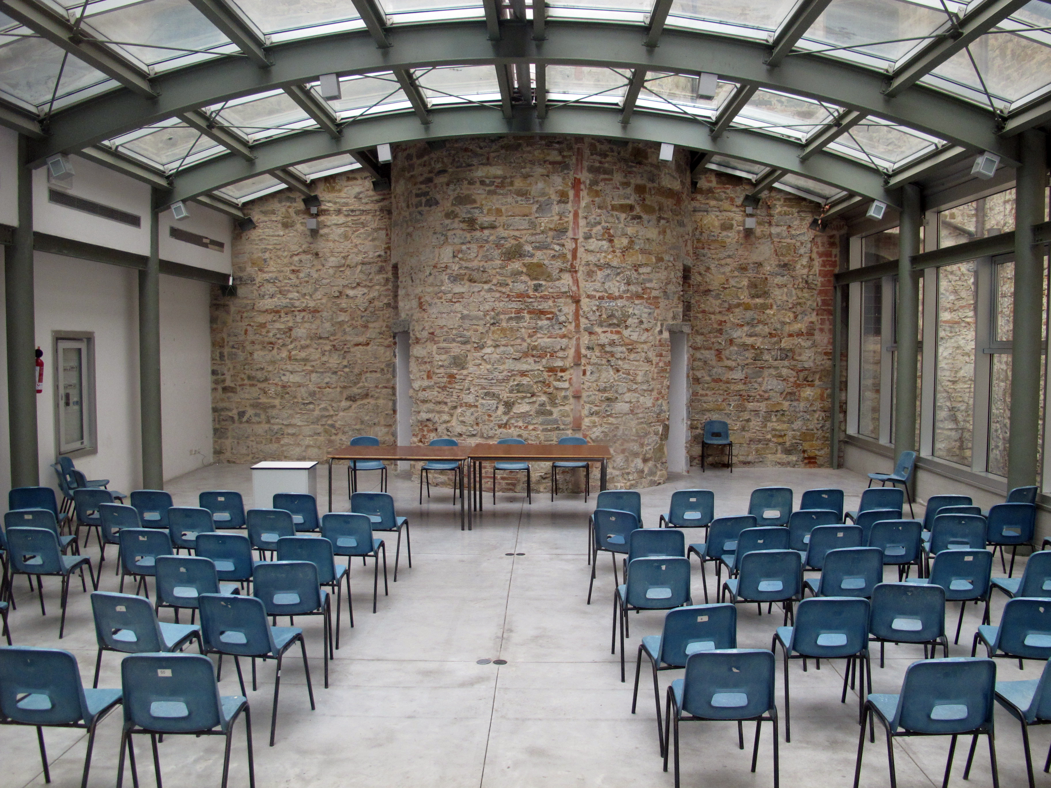 Le murate, Sala delle vetrate